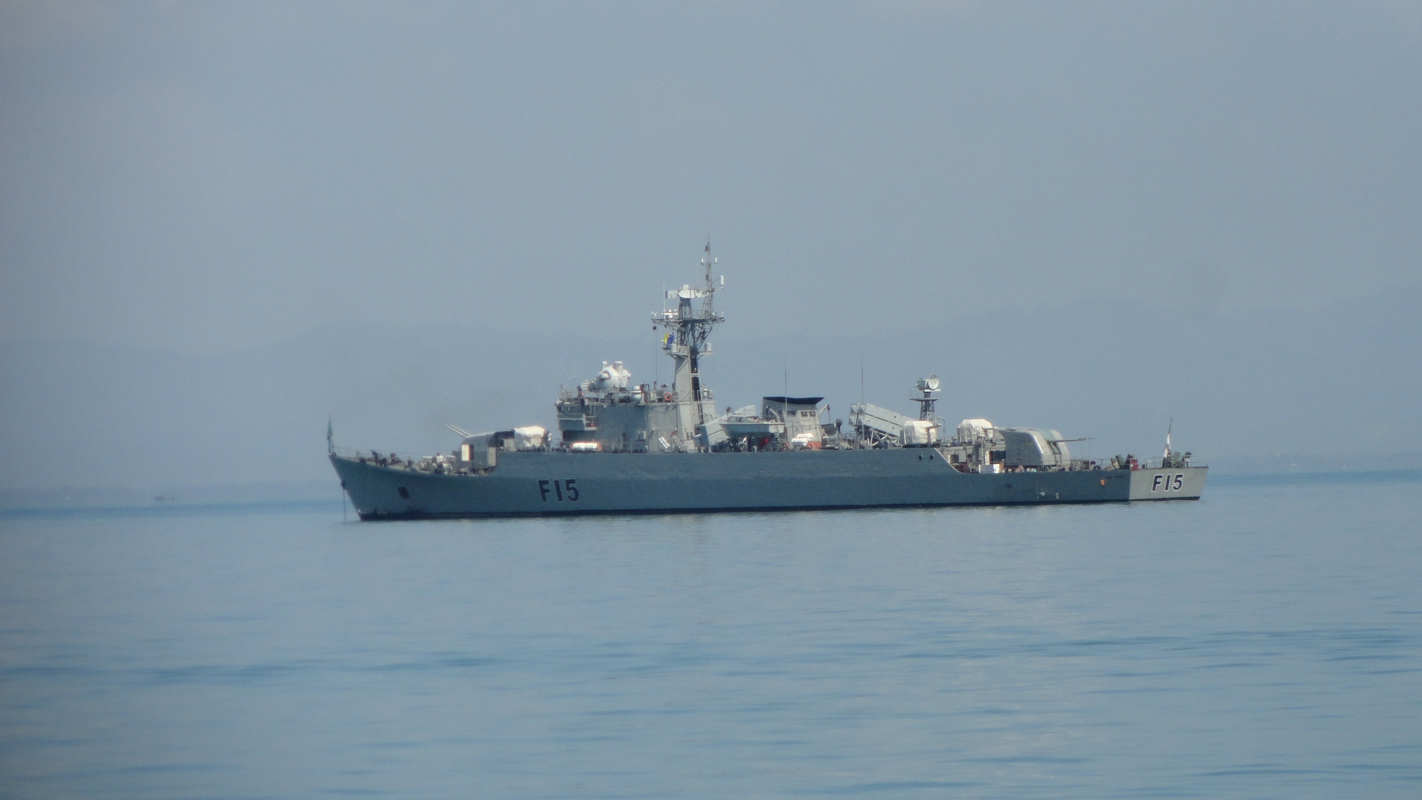 বাংলাদেশ নৌবাহিনীর কোস্টগার্ড